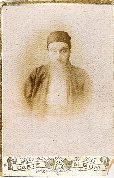 תמונתו של הרב מנחם שם טוב הכהן חסיד